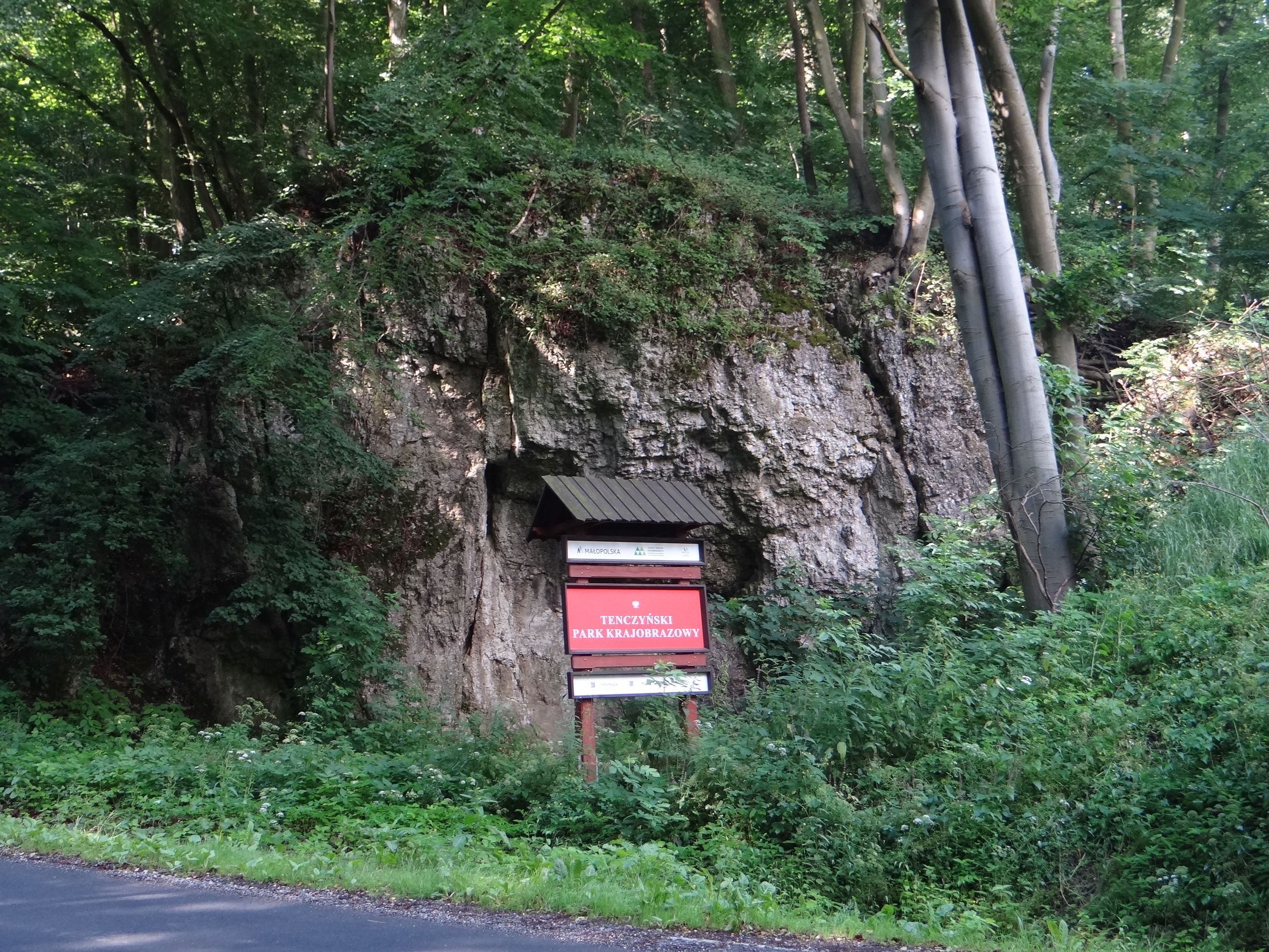 Skała w Wąwozie Kochanowskim